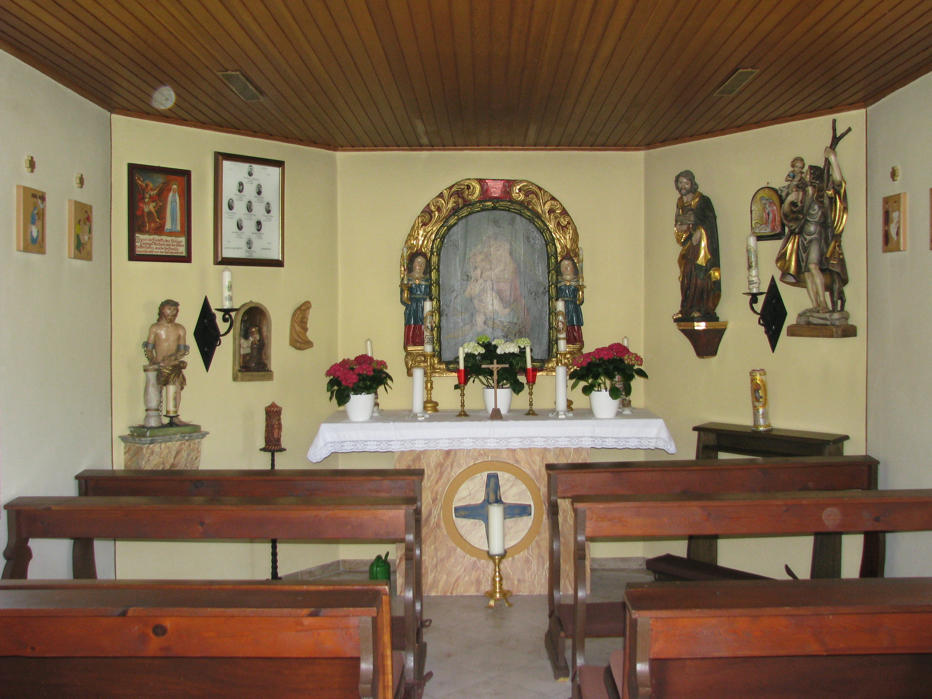 Ortskapelle von Unterwall / Oberwall, Ortsteile von Berg bei Neumarkt in der Oberpfalz